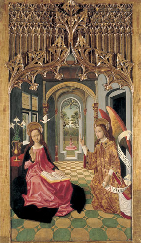 L'Anunciació- Mestre de la Seu d'Urgell-MNAC